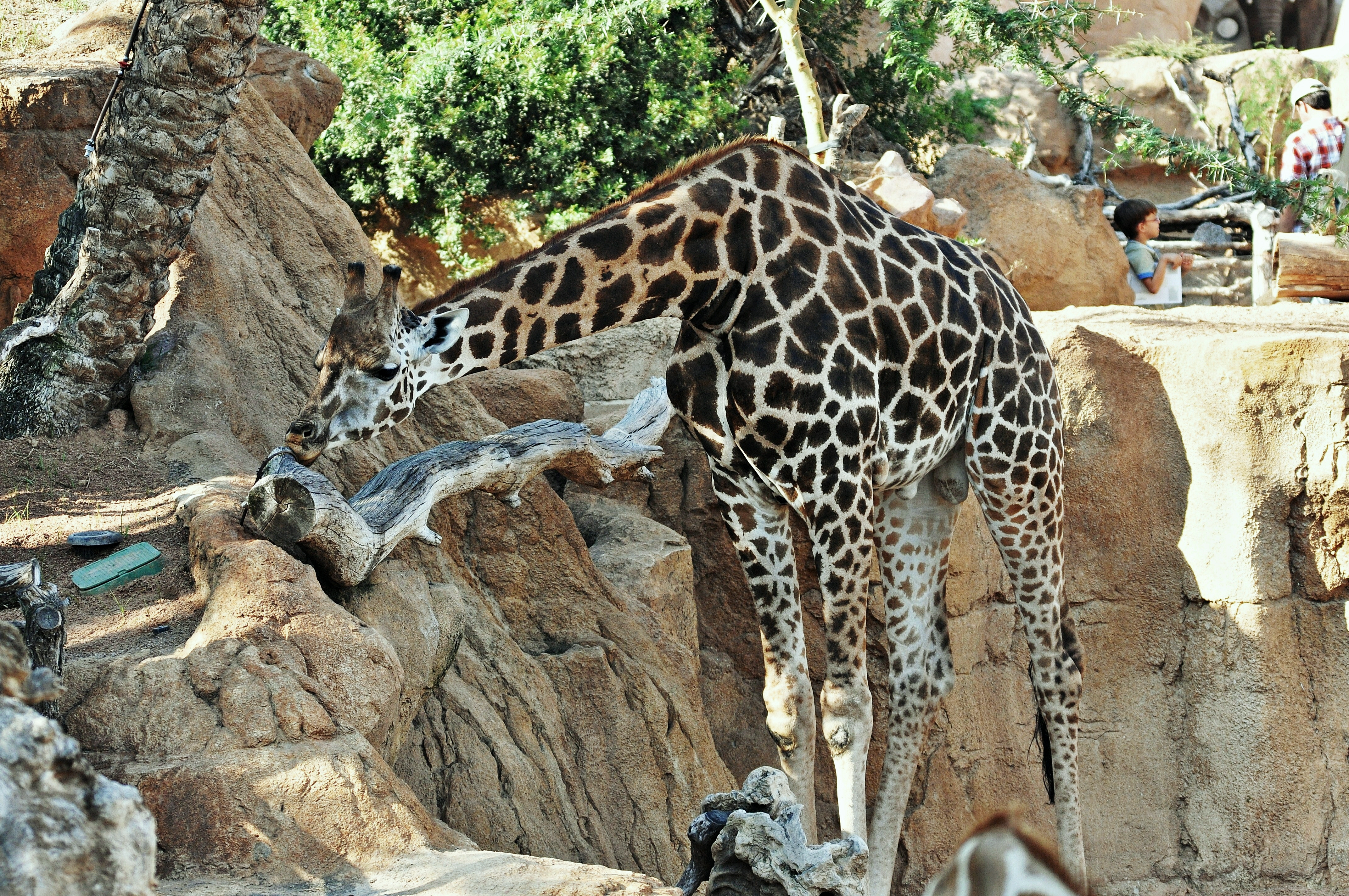 comunidad valenciana-españa